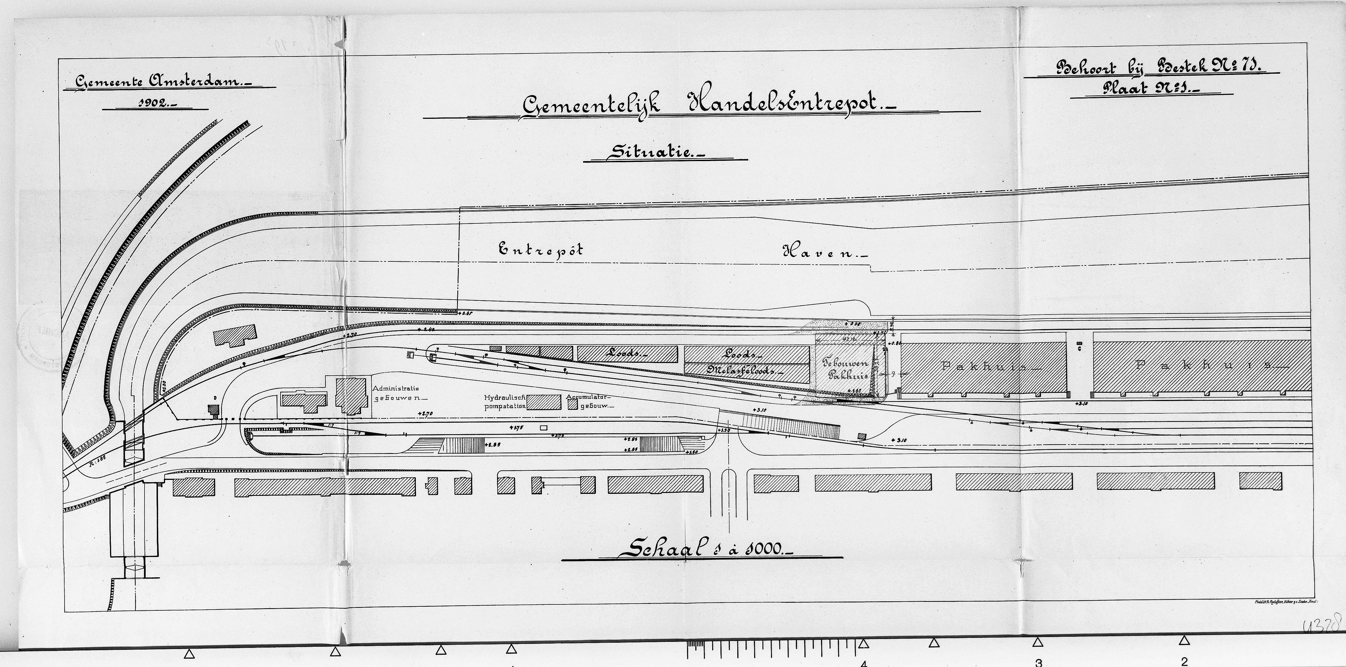 Beschrijving Cruquiusweg 25 Bouwen van een pakhuis. Documenttype bouwtekening Collectie Archief van de Dienst Bouw- en Woningtoezicht: bouwtekeningen Datering 1902 Geografische naam Cruquiusweg Inventarissen Afbeeldingsbestand 5221BT904328